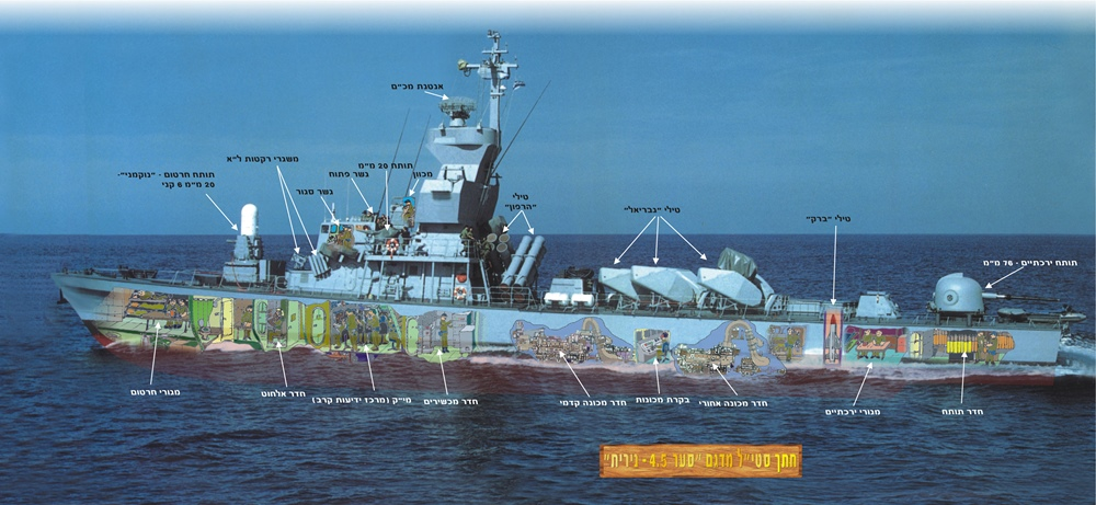 חתך ספינת טילים סער 4.5